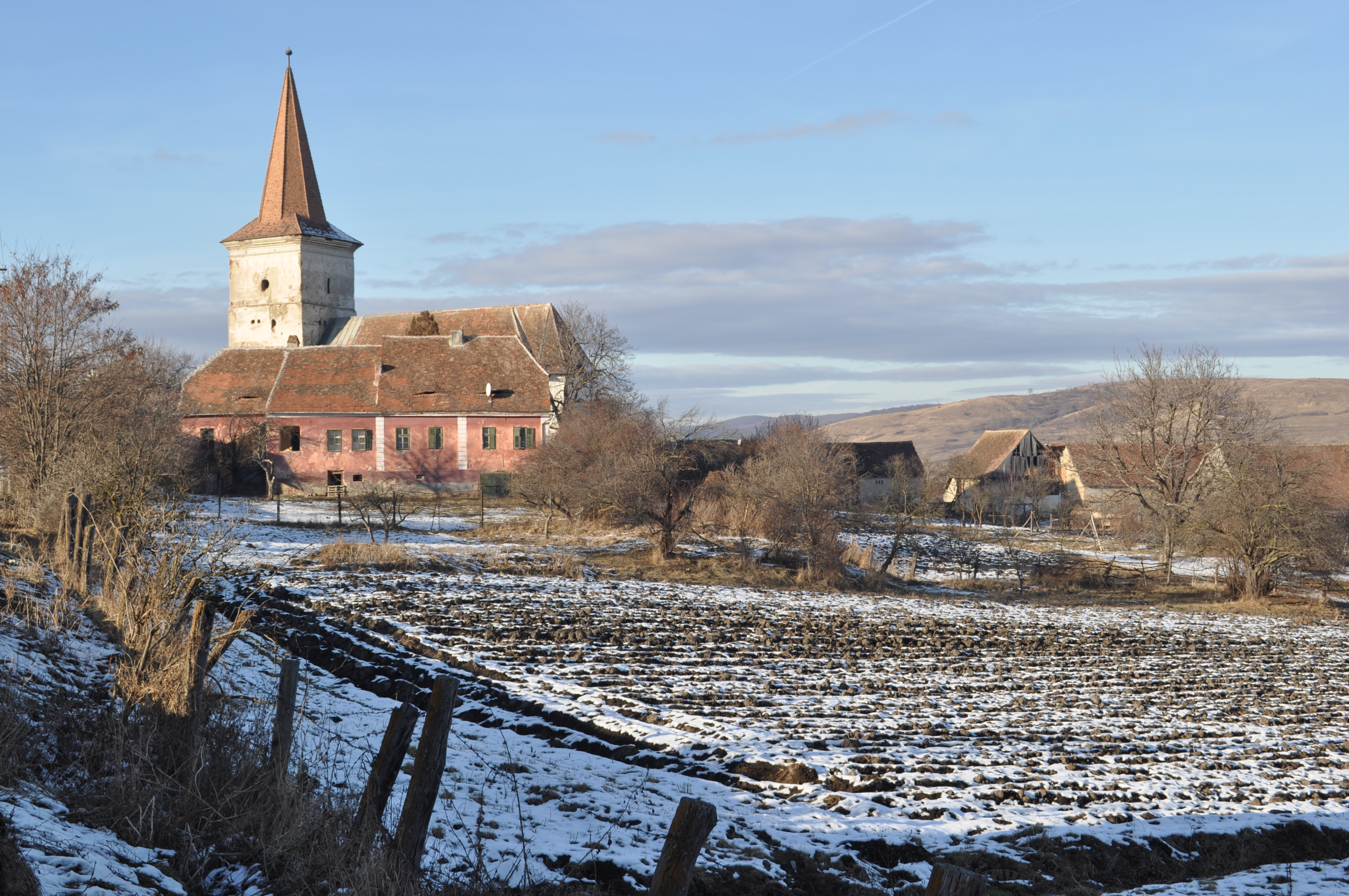 Biserica evanghelică, sat NOU; comuna ROŞIA 01